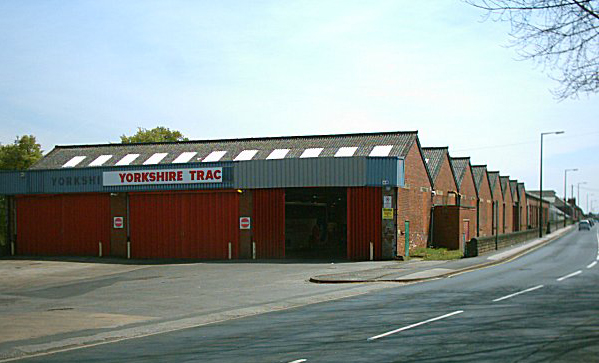 Barnsley Tramway, Barnsley.